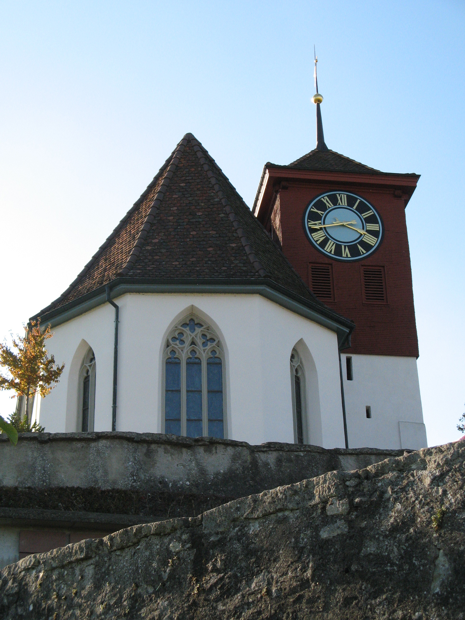 Turm und Chor der Staufbergkirche